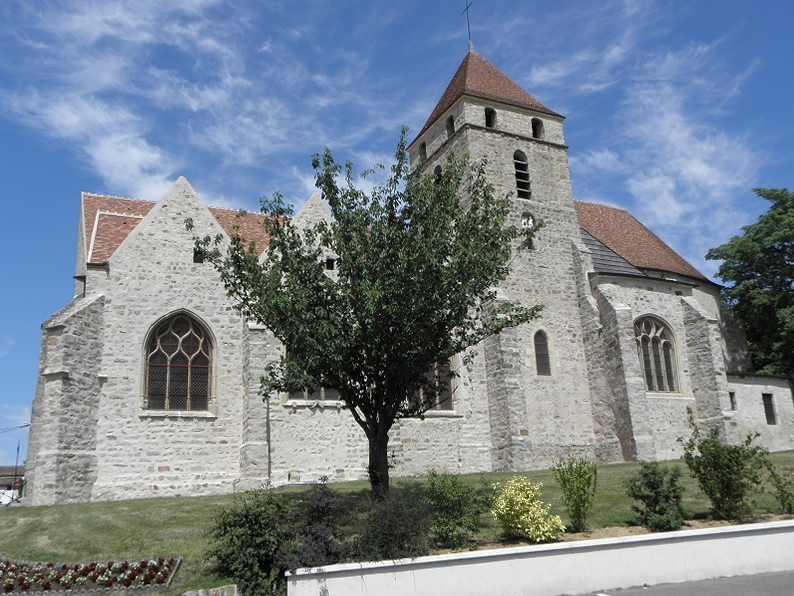 Vue méridionale de l'église Saint-Loup de Courlon-sur-Yonne (89).